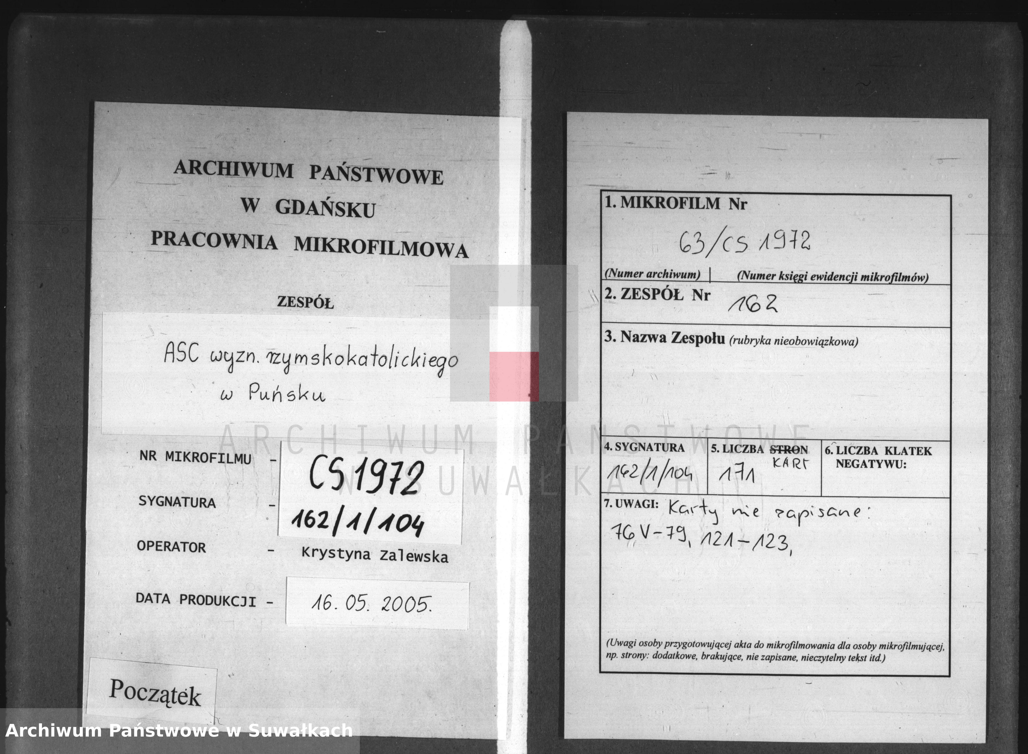 Punsko Švenčiausios Mergelės Marijos Dangun Ėmimo bažnyčios 1902 metų krikšto, santuokų ir mirčių metrikų knyga